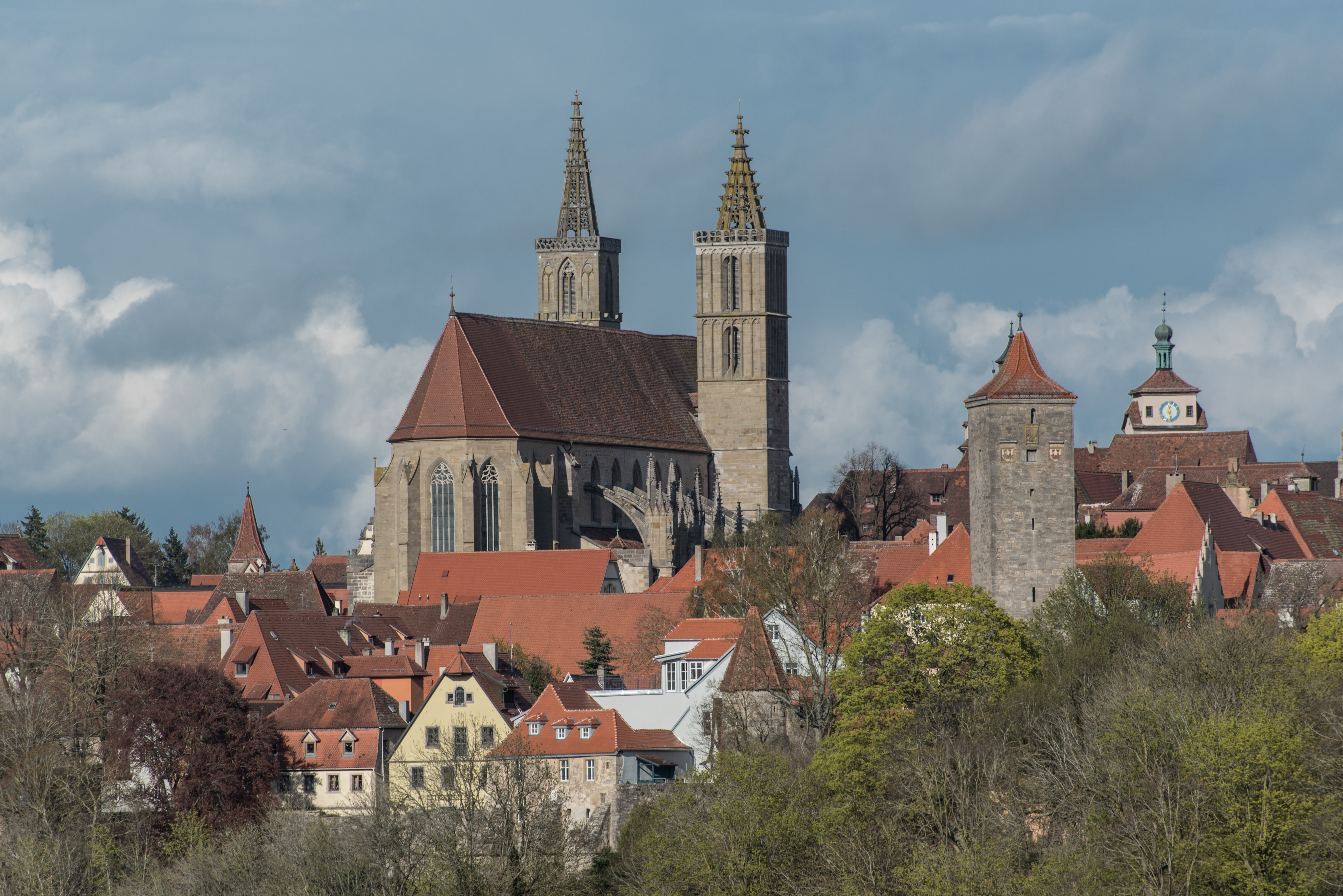 Rothenburg ob der Tauber, Panorama von Westen